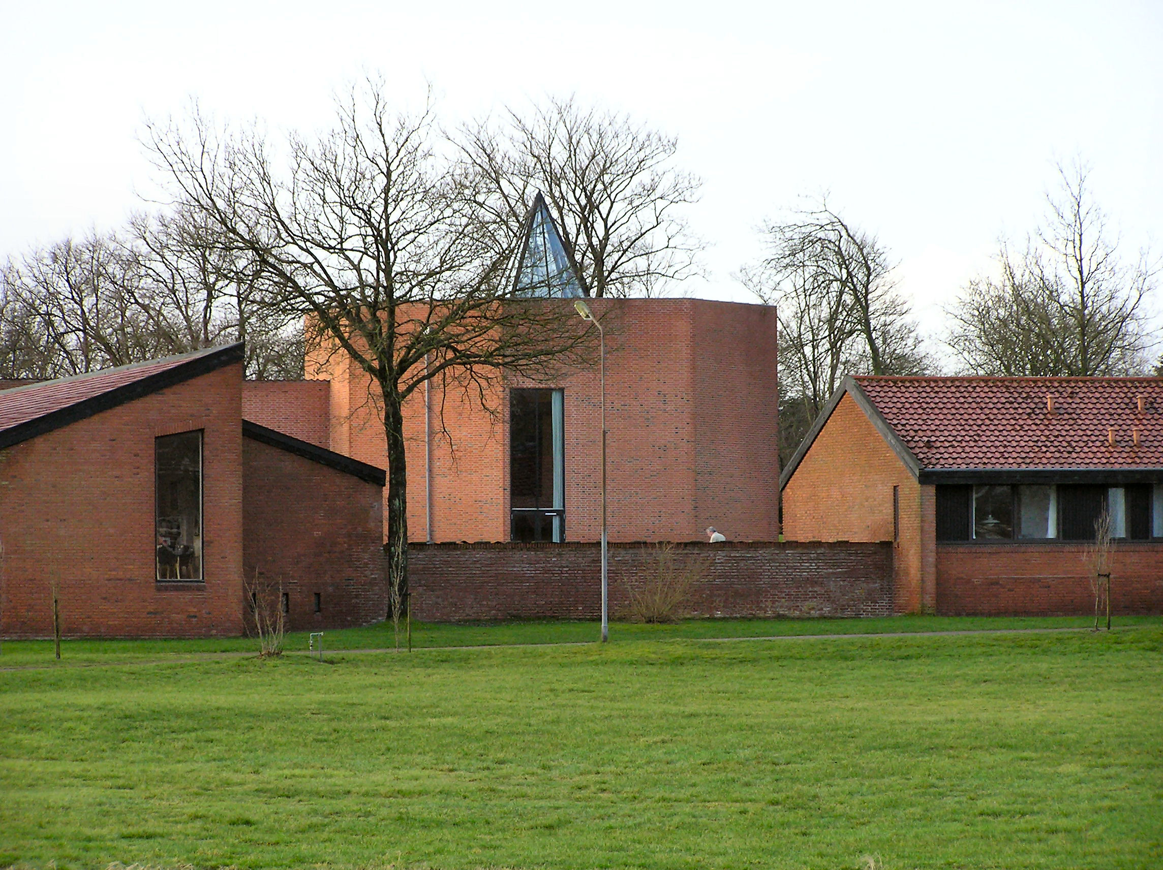 Løgumkloster Højskole